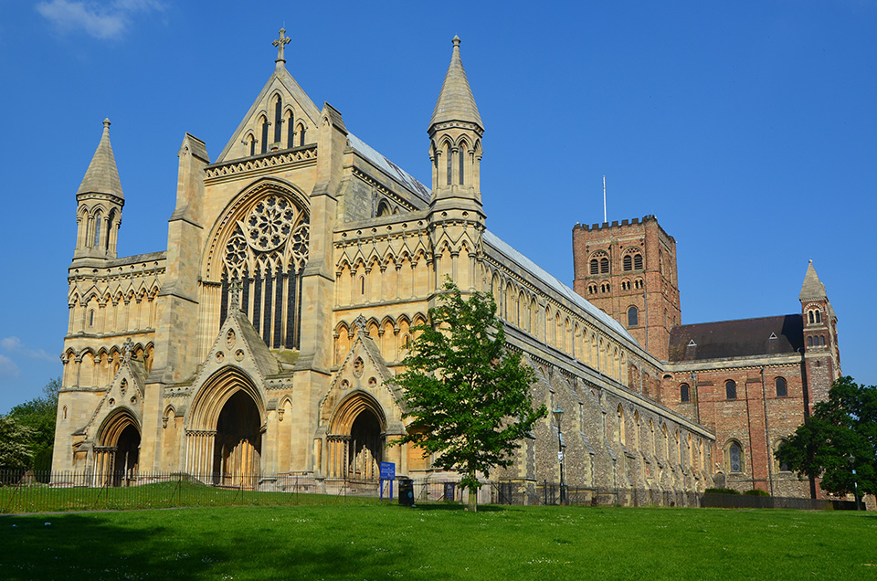 St. Albans katedrális (Hertfordshire megye, Anglia)